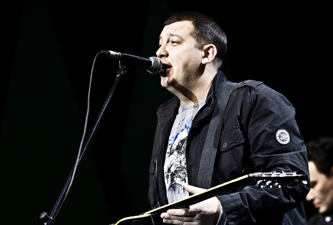 Сергей Бобунец на концерте НАУ 25